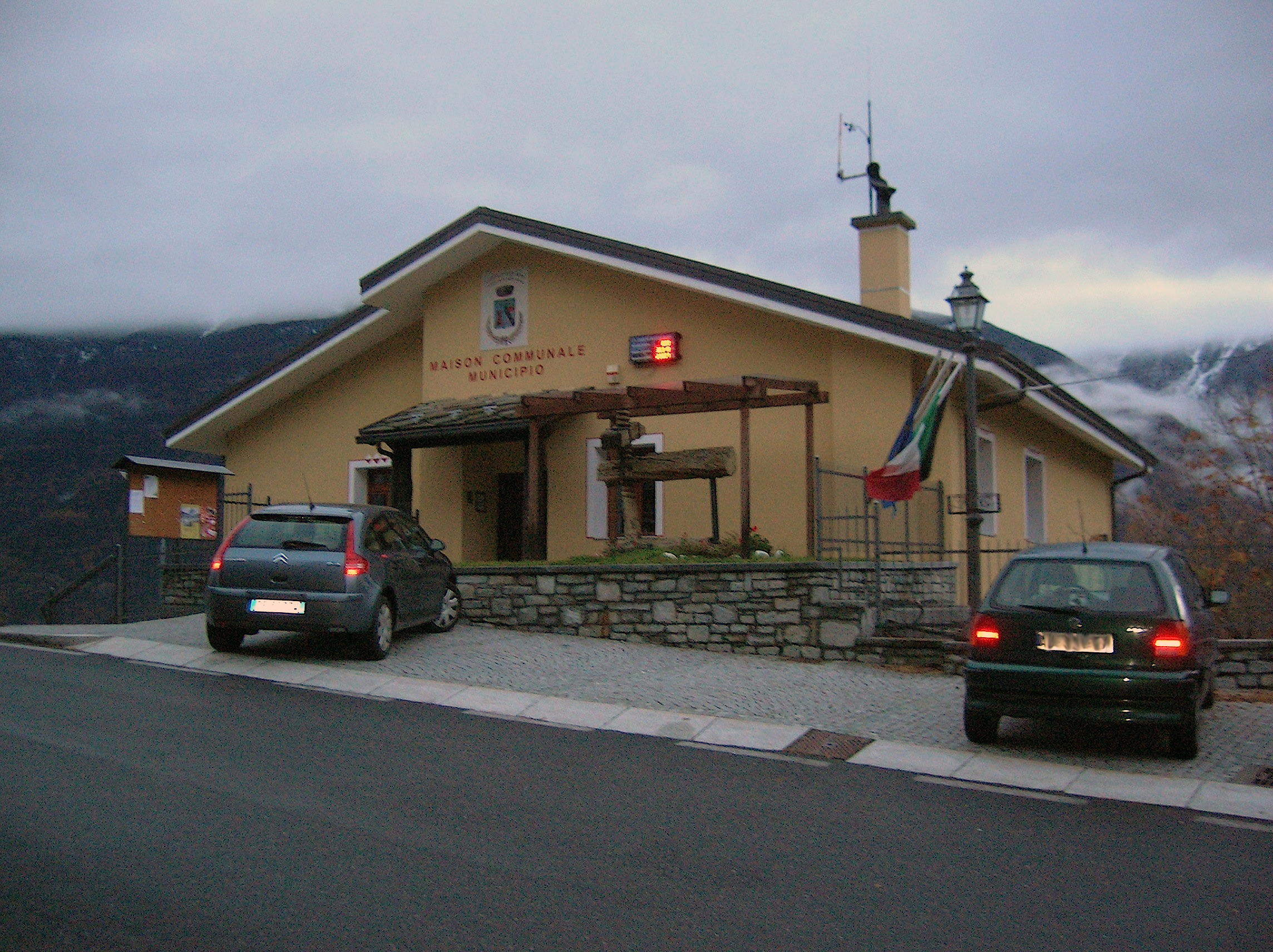 Municipio di Saint-Denis, Valle d'Aosta, Italia.